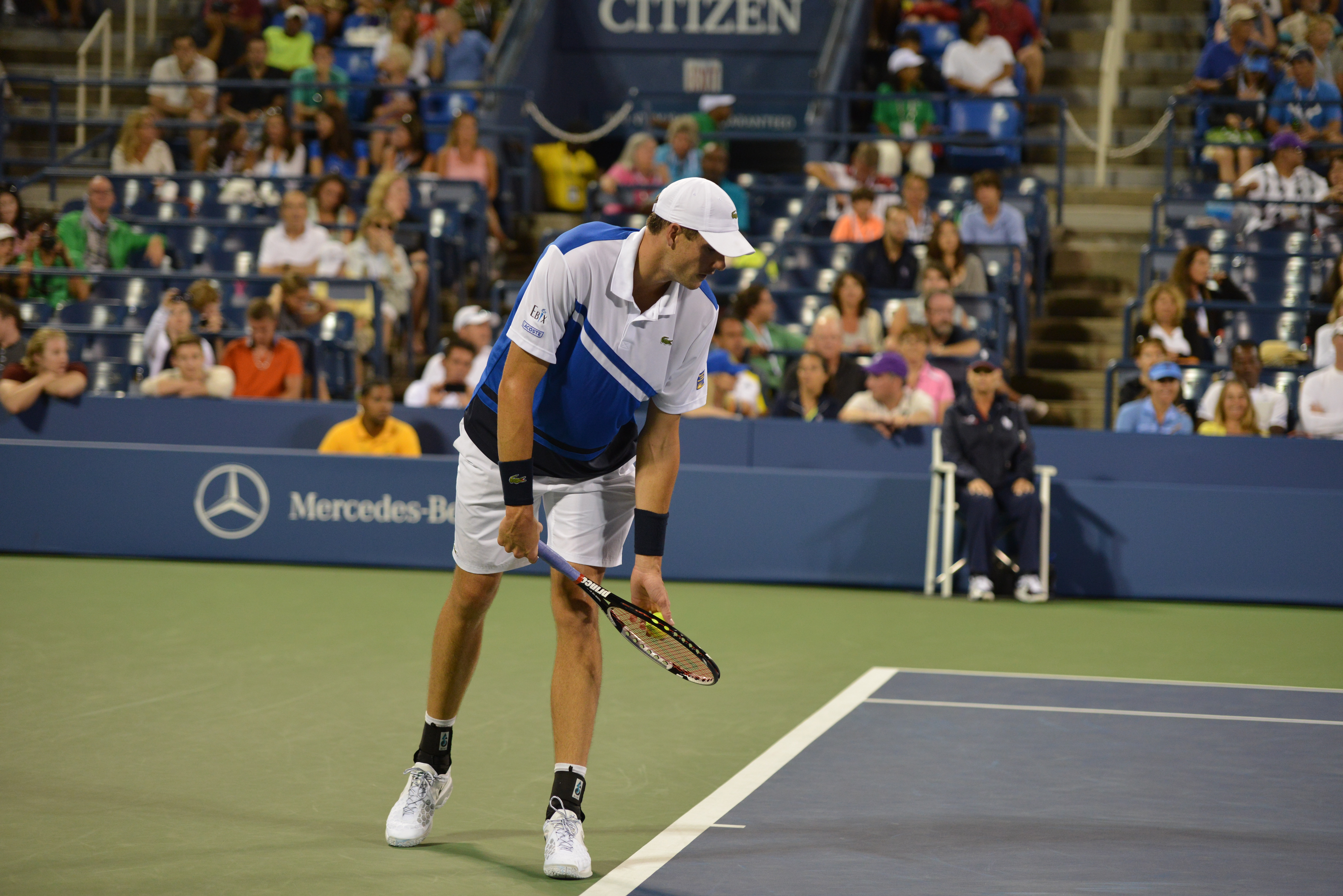 John Isner vs Gael Monfils US Open 2013